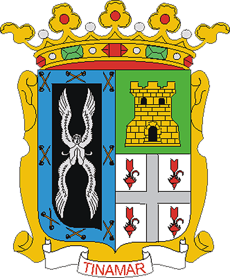 Escudo de Vega de San Mateo, provincia de Las Palmas (España)